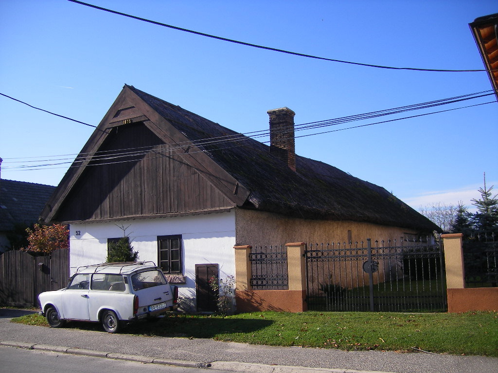 Szap - 1875-ben épült ház